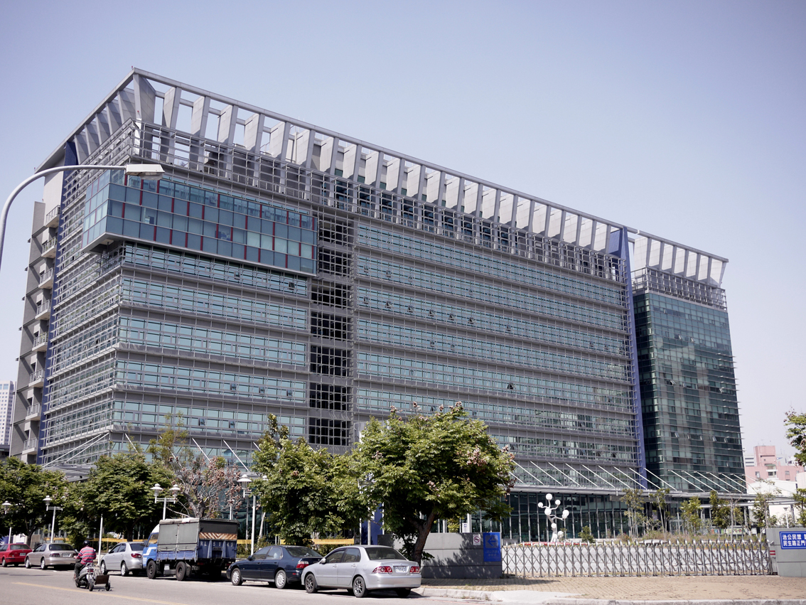 財政部中區國稅局大樓